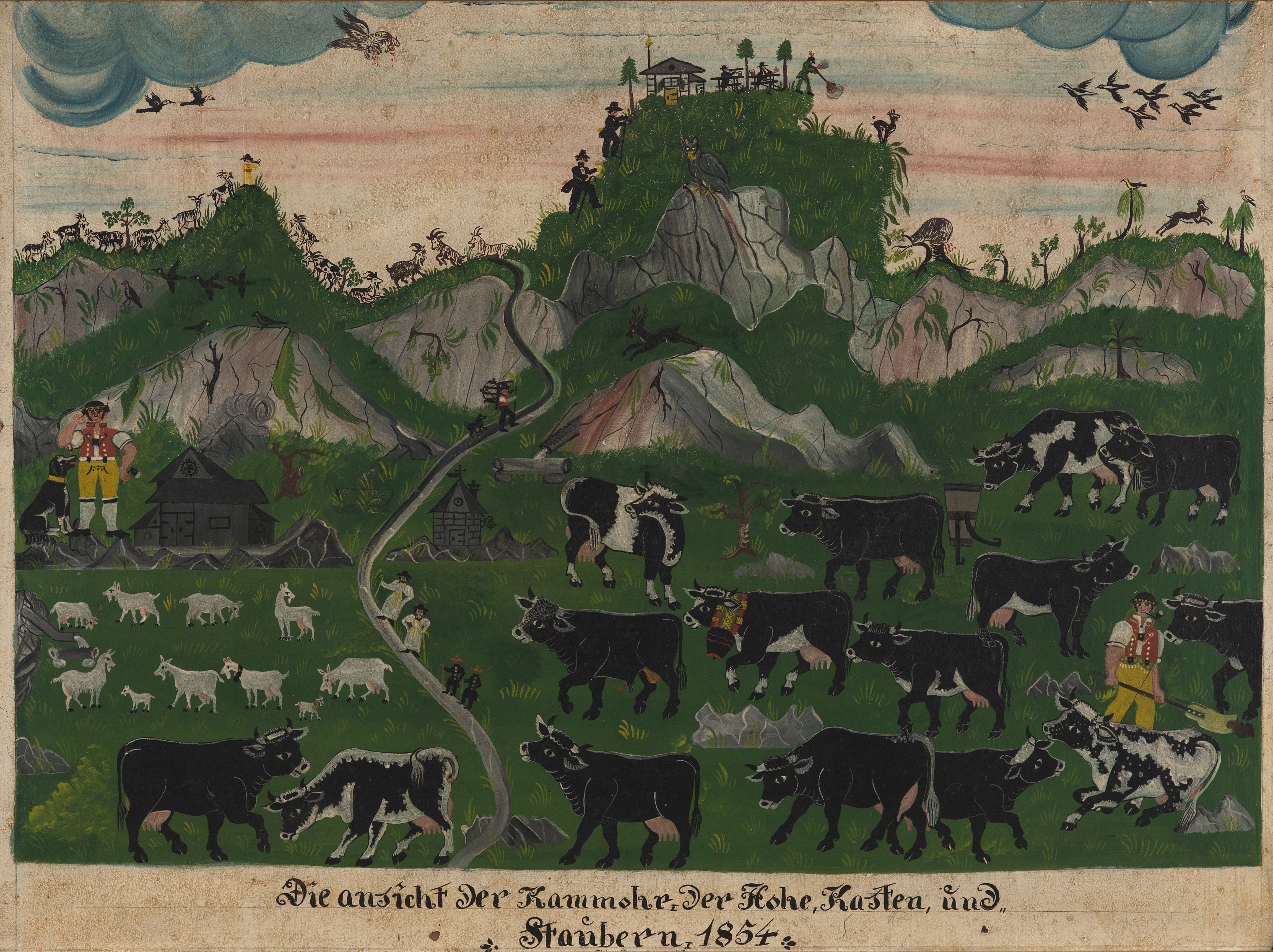 Bartholomäus Lämmler (1809–1865): Viehweide unter Kamor, Hohem Kasten und Staubern, 1854, Öl auf Karton, 51 x 68,5 cm